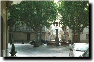 Plaça Gran de Sant Vicenç de Castellet